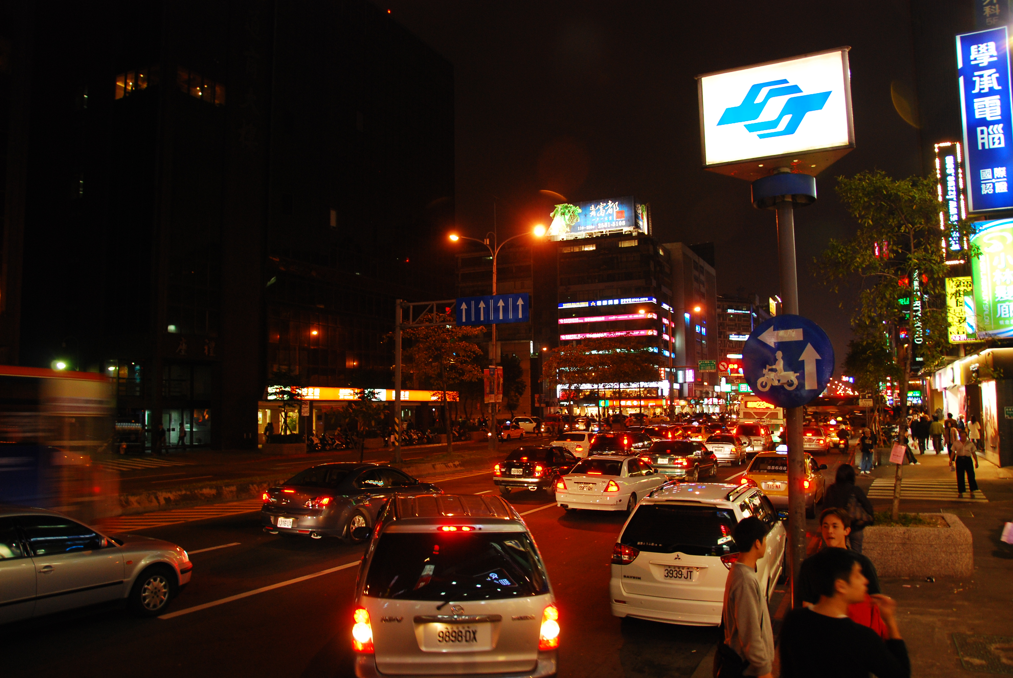 中文（台灣）: 台北市忠孝東路四段，近台北捷運忠孝敦化站。